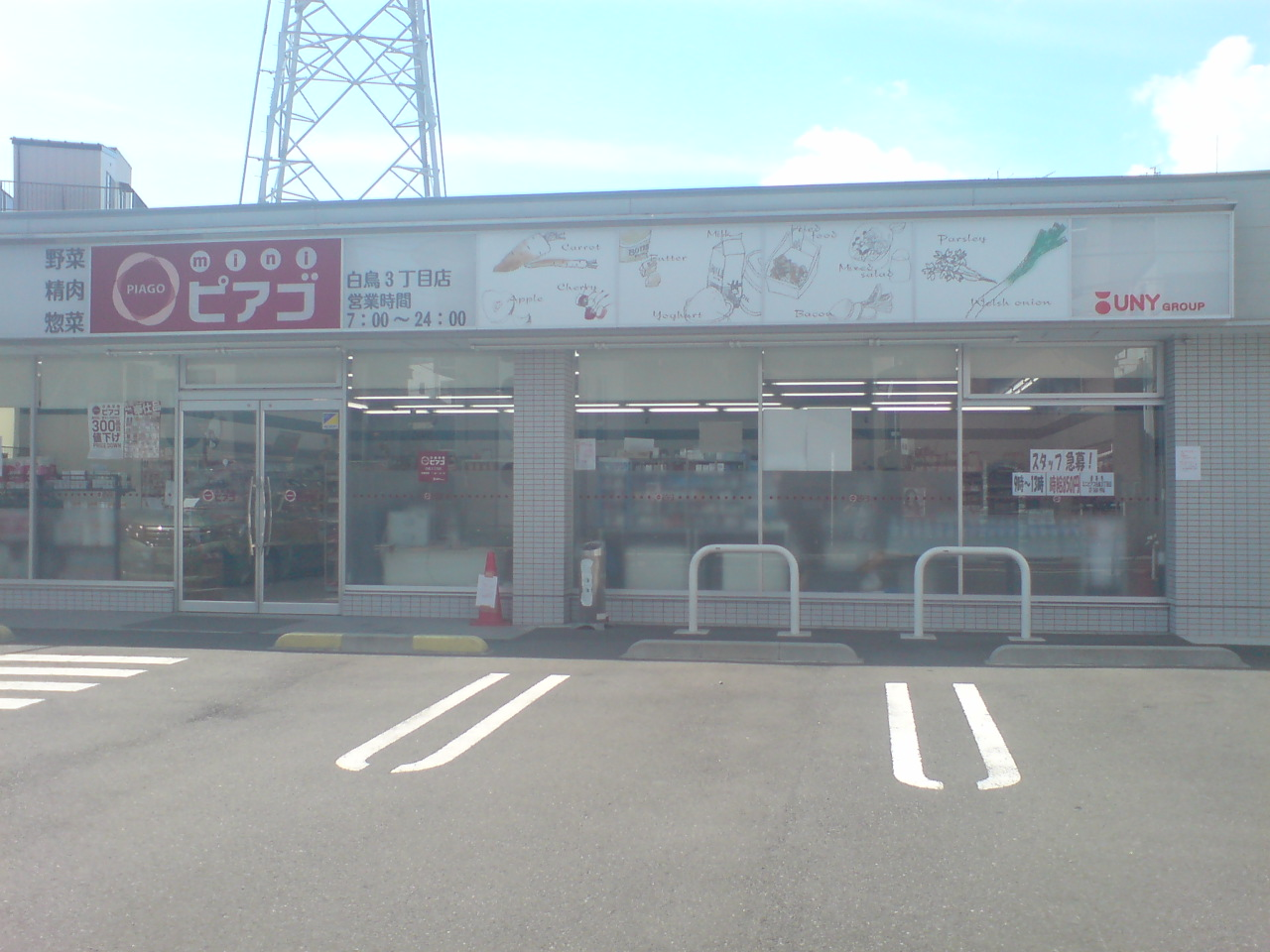 ミニピアゴ白鳥３丁目店